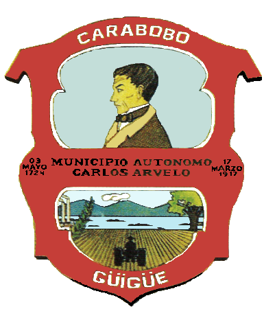 Escudo del municipio Carlos Arvelo, estado Carabobo, Venezuela